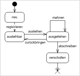 UML State diagram